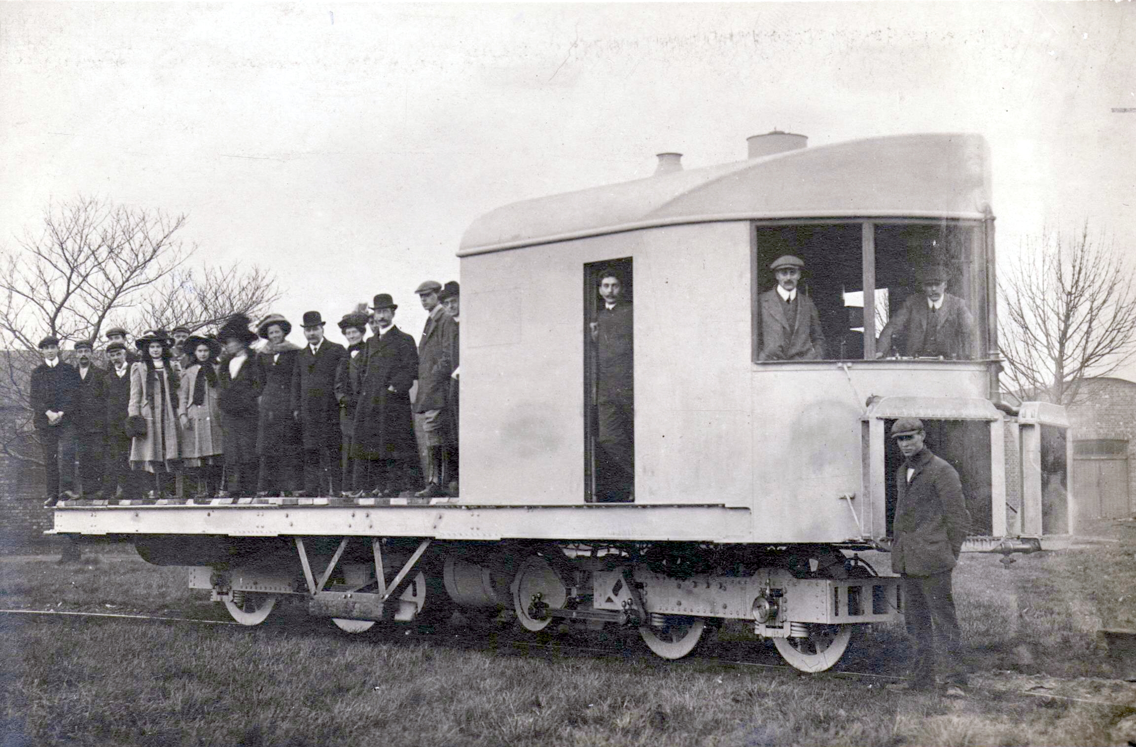 Carte postale ancienne (CPA)